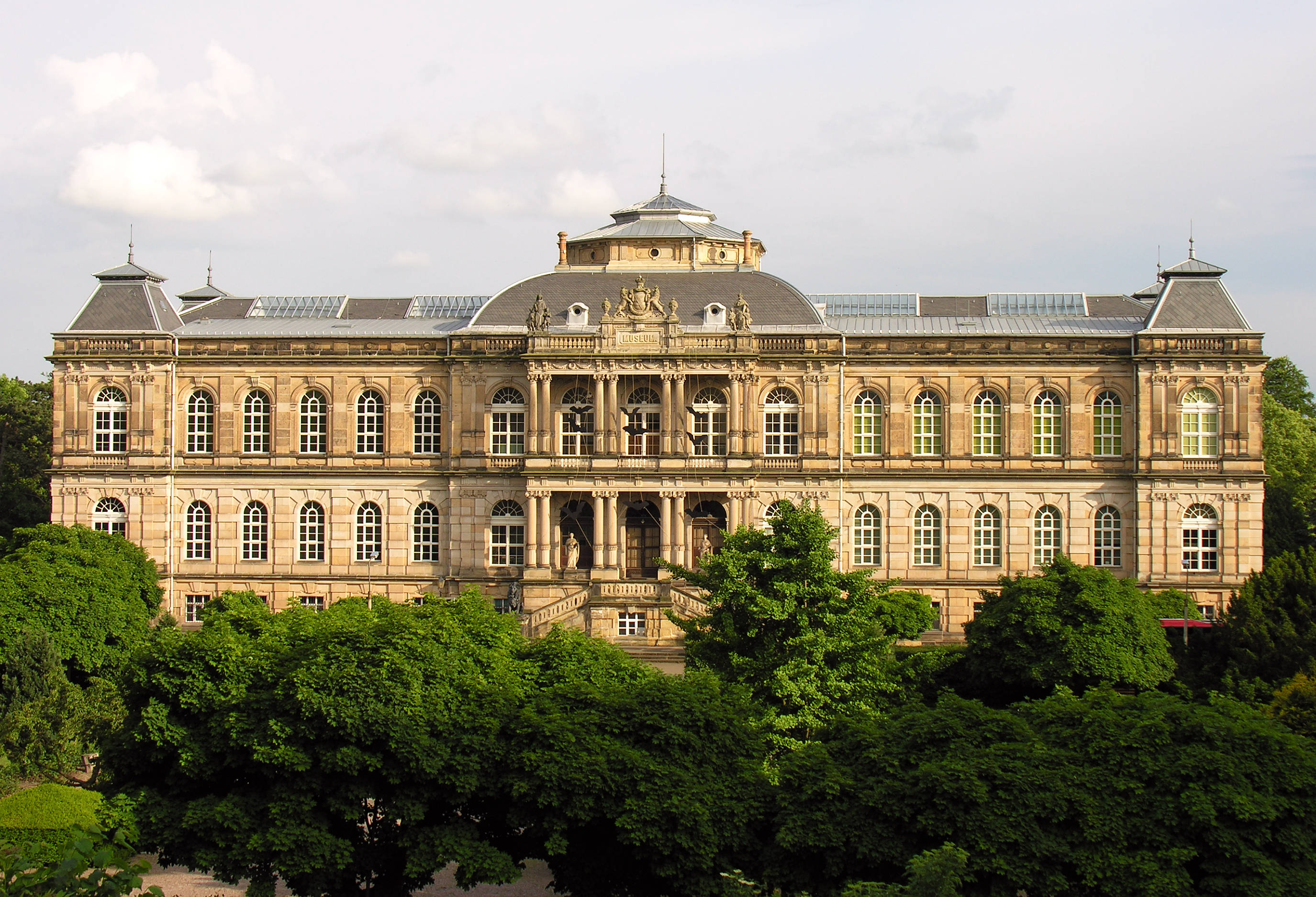 Herzogliches Museum, heute Kunstmuseum der Stiftung Schloss Friedenstein Gotha, vor 2010 genutzt als Museum der Natur. Thüringen, Deutschland. - Foto Wolfgang Pehlemann DSCN3016